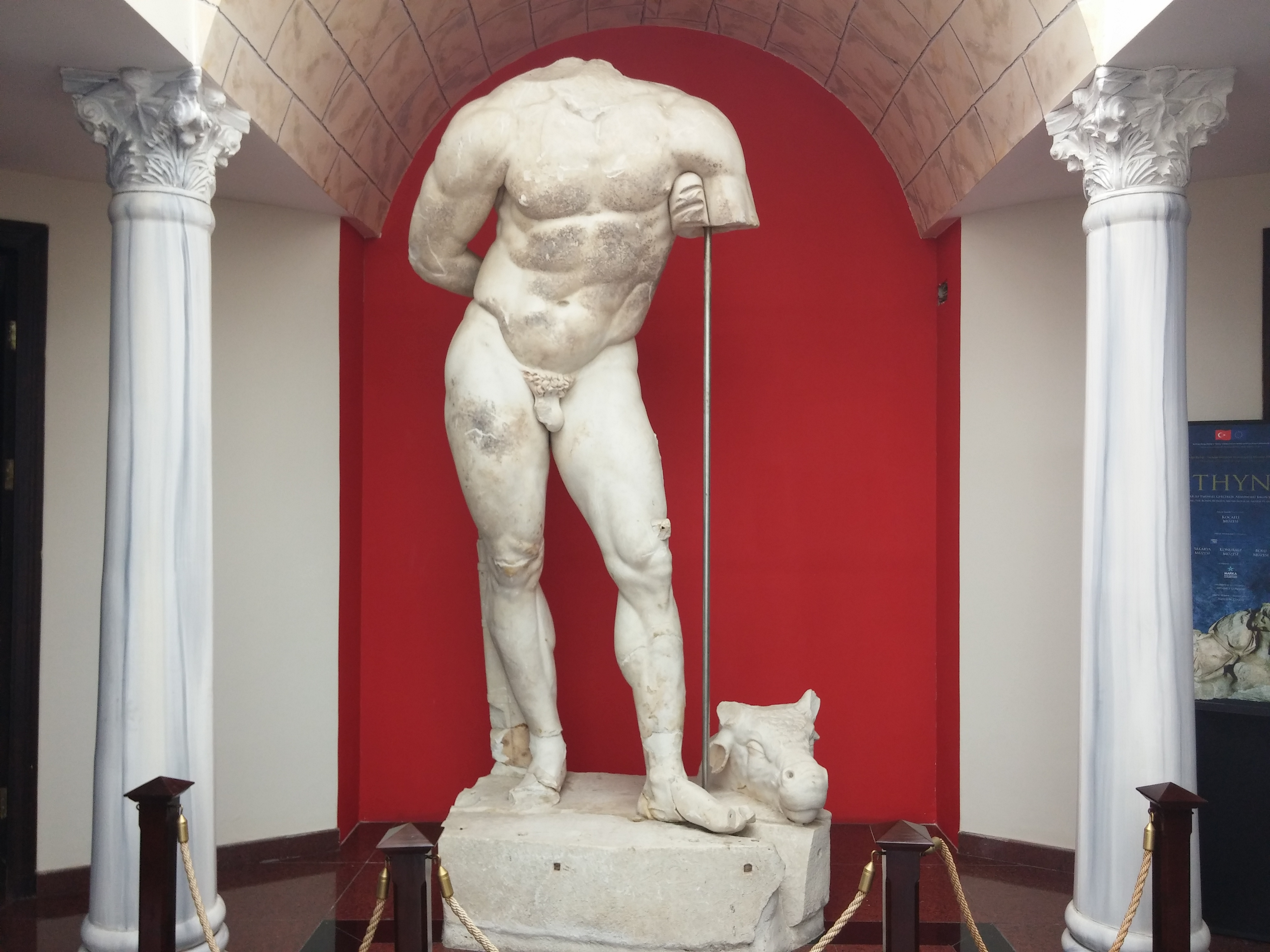 Kocaeli Arkeoloji ve Etnografya Müzesinde sergilenen ve Roma dönemine tarihlenen mermer Herakles heykeli.